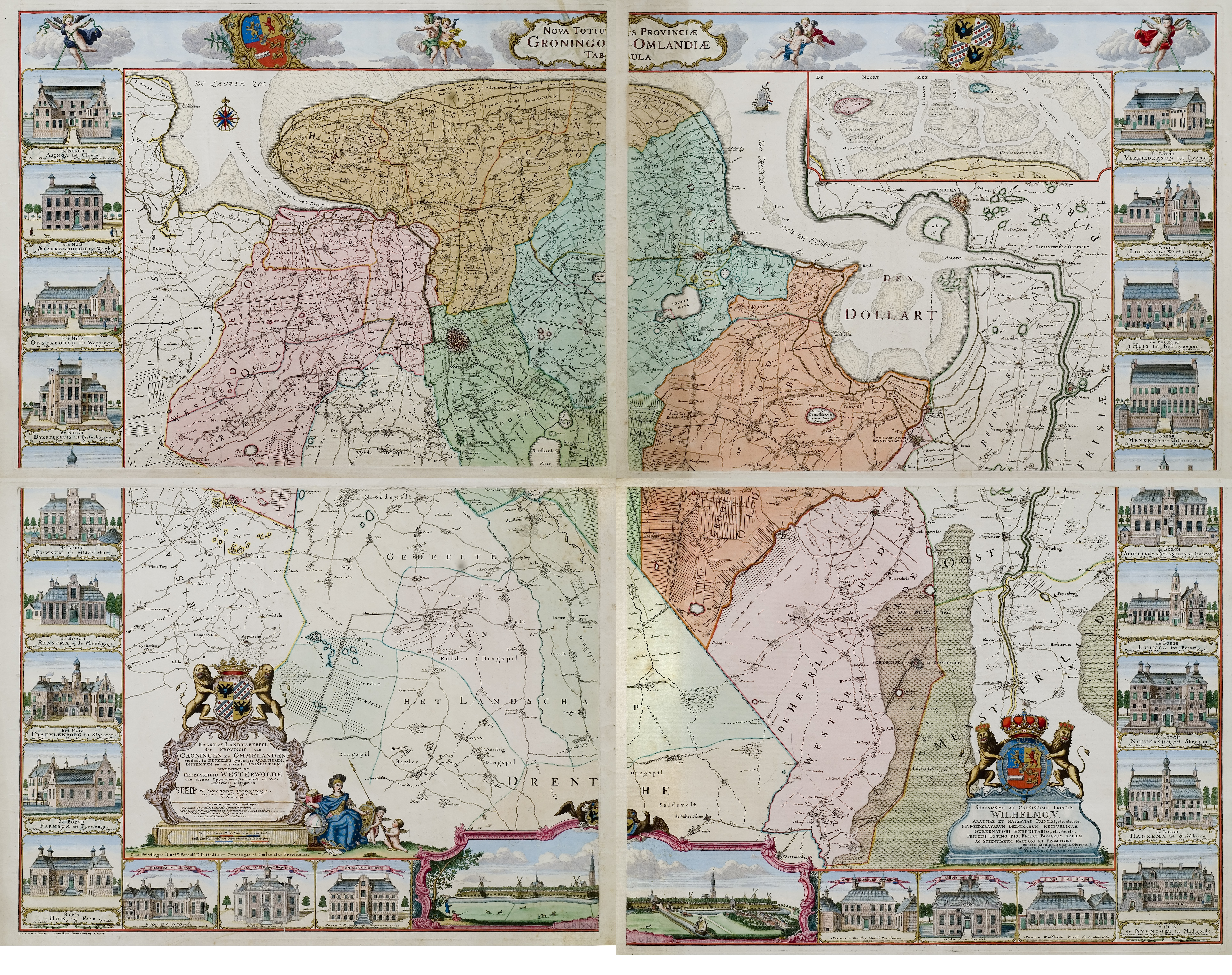 Beckeringhkaart of Borgenkaart. Eigenlijke naam: "Kaart of landtafereel der provincie van Groningen en Ommelanden verdeelt in deszelfs byzondere quartieren, districten en voornaamste iurisdictien : beneffens de Heerlykheid Westerwolde"